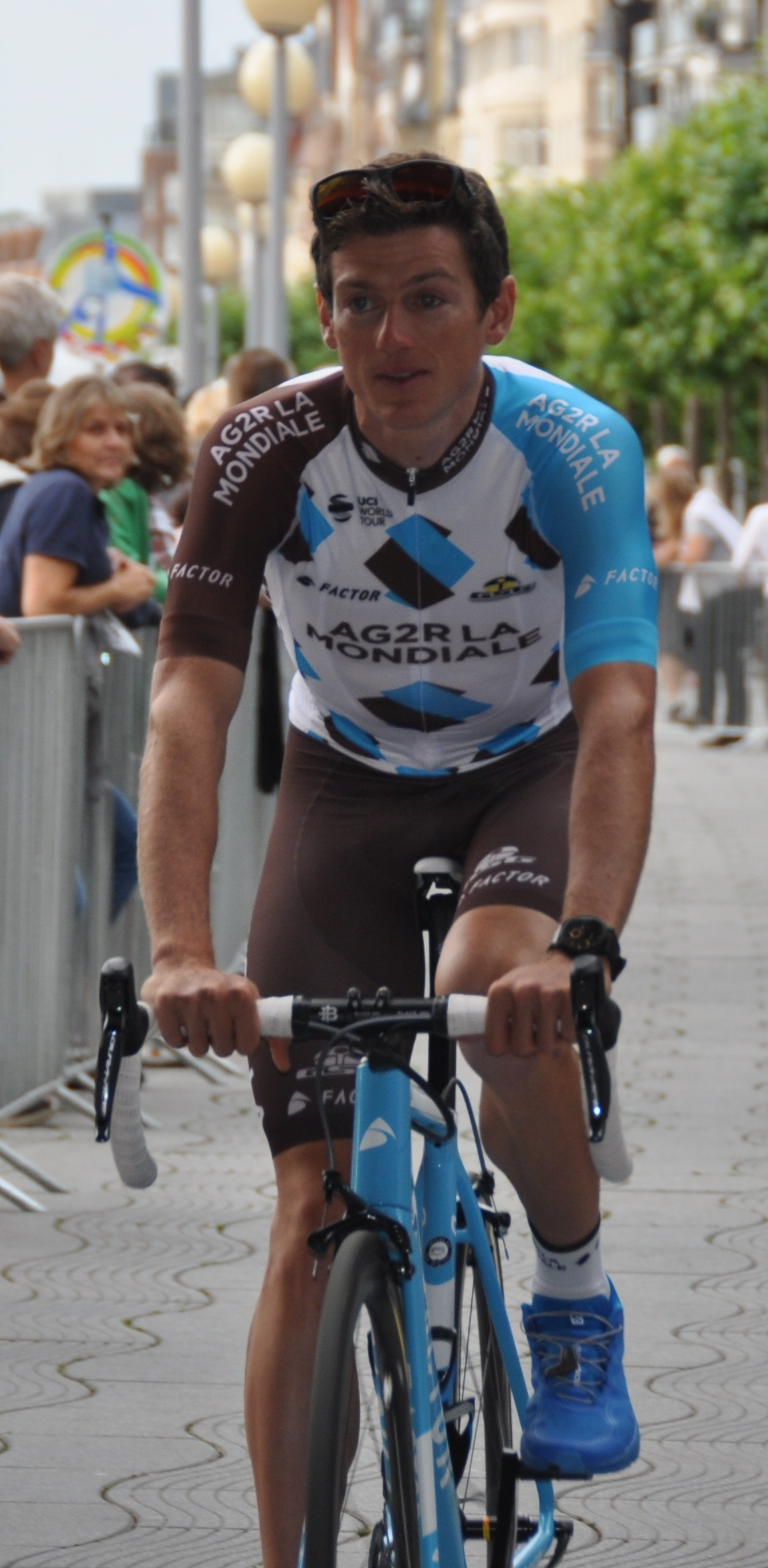 Mathias Frank, Schweizer Radrennfahrer